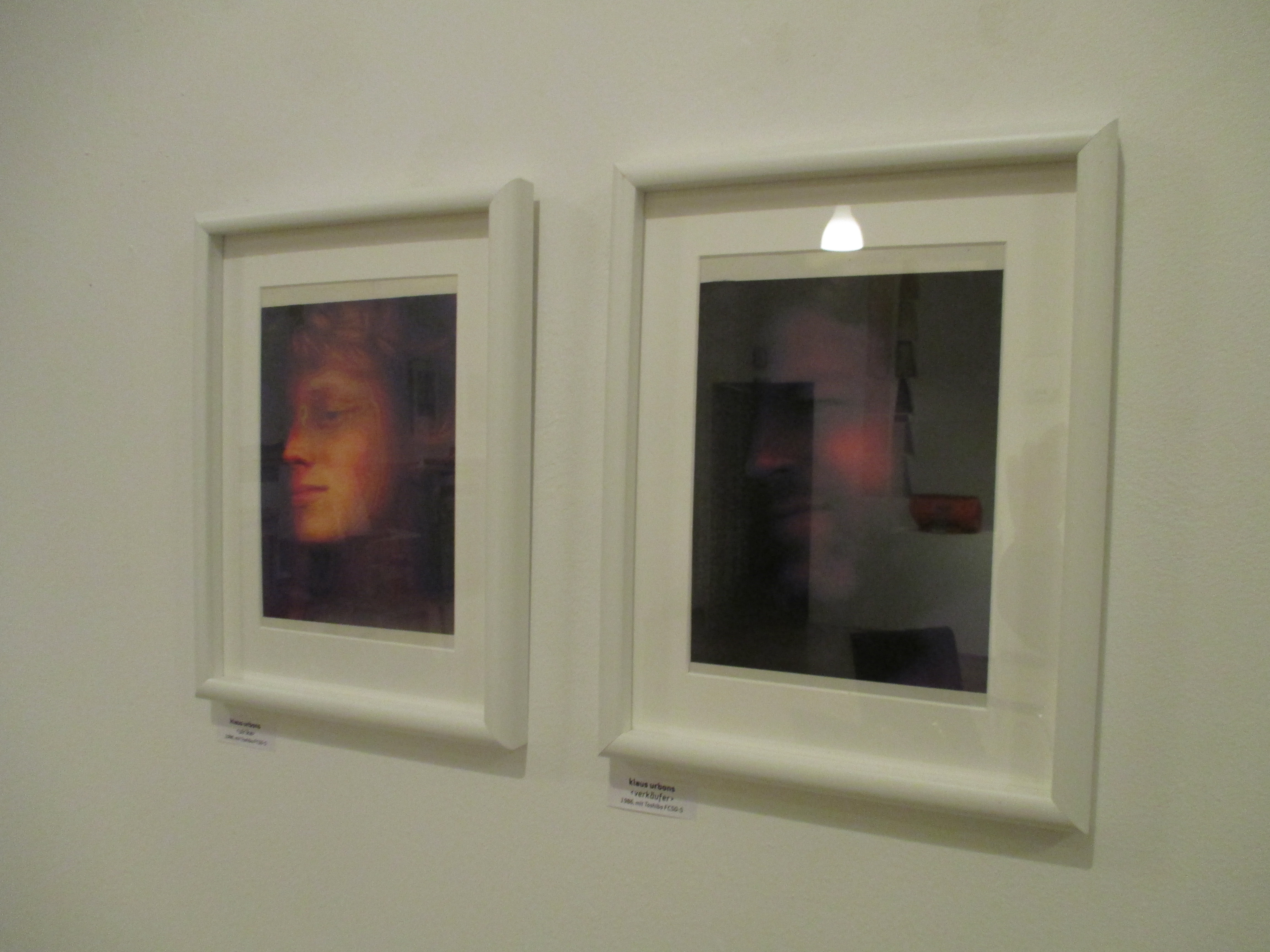 Makroscope - Useum für Fotokopie, Sammlung Urbons: Copy-Art "Verkäufer" von Klaus Urbons.